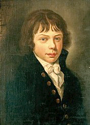 Tadeusz Kościuszko as adolescent